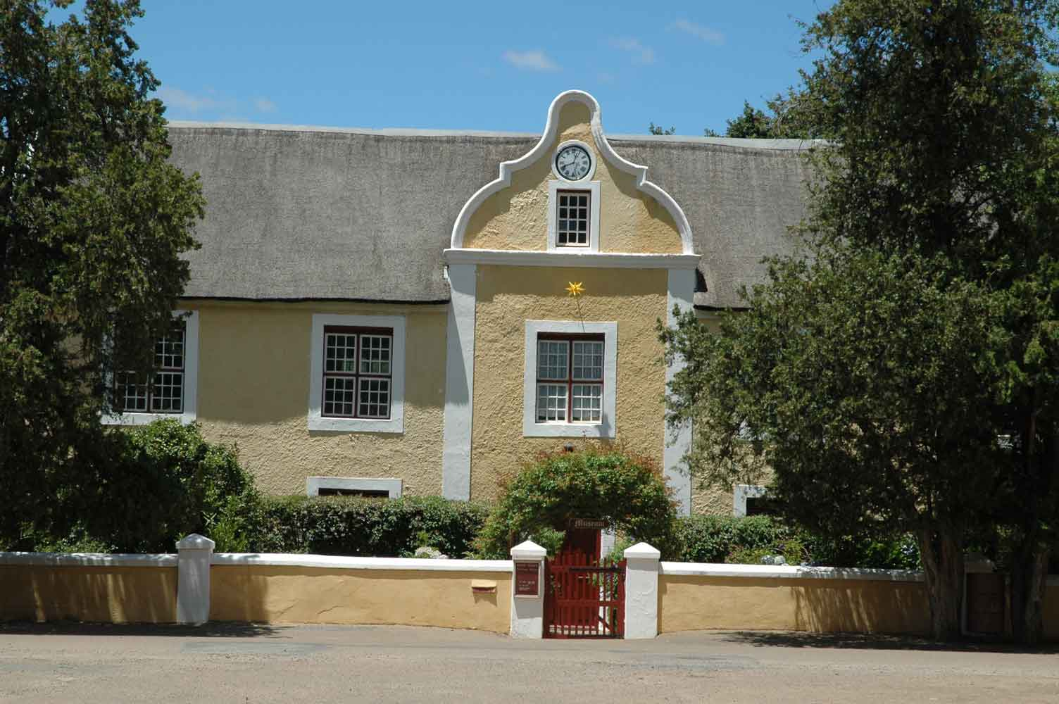 Die Morawiese Sendingsmuseum op Genadendal.